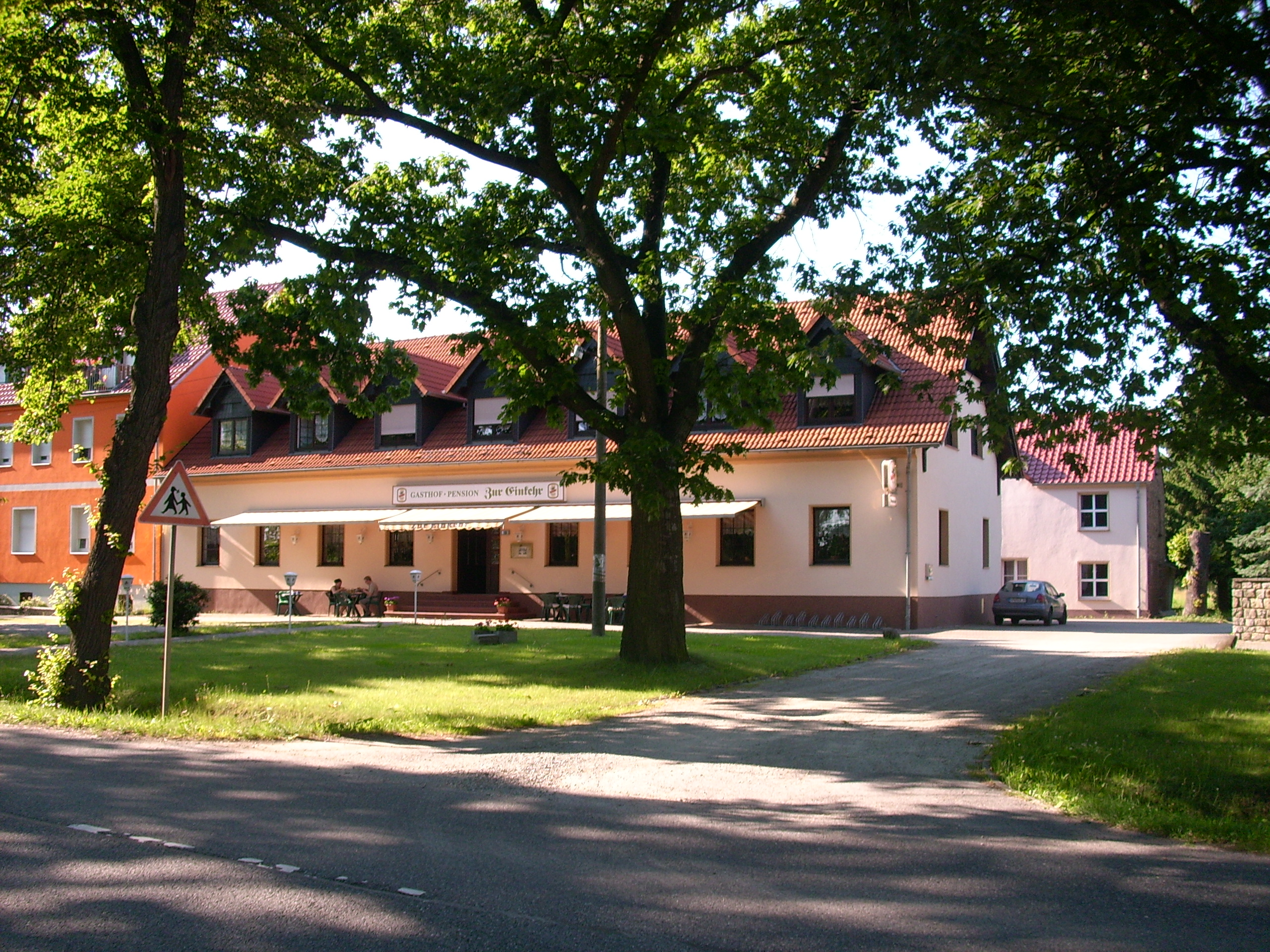 Gasthof „Zur Einkehr“ in Bluno Hornjoserbsce: Blunjanski hosćenc